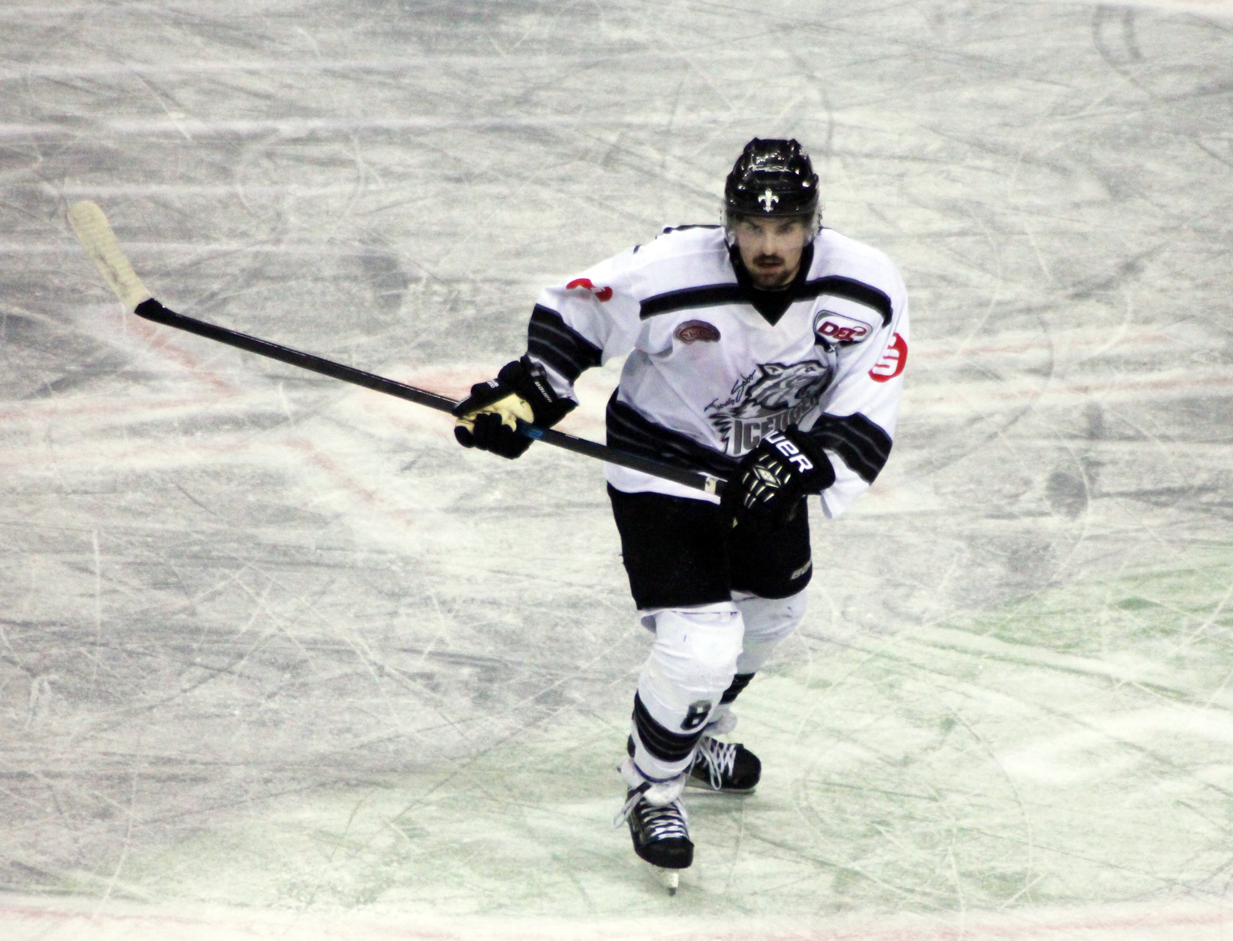 Spieler Marco Nowak (#8) der Nürnberg Ice Tigers in der O2-World Berlin (spiel gegen Eisbären Berlin) am 15.02.2015